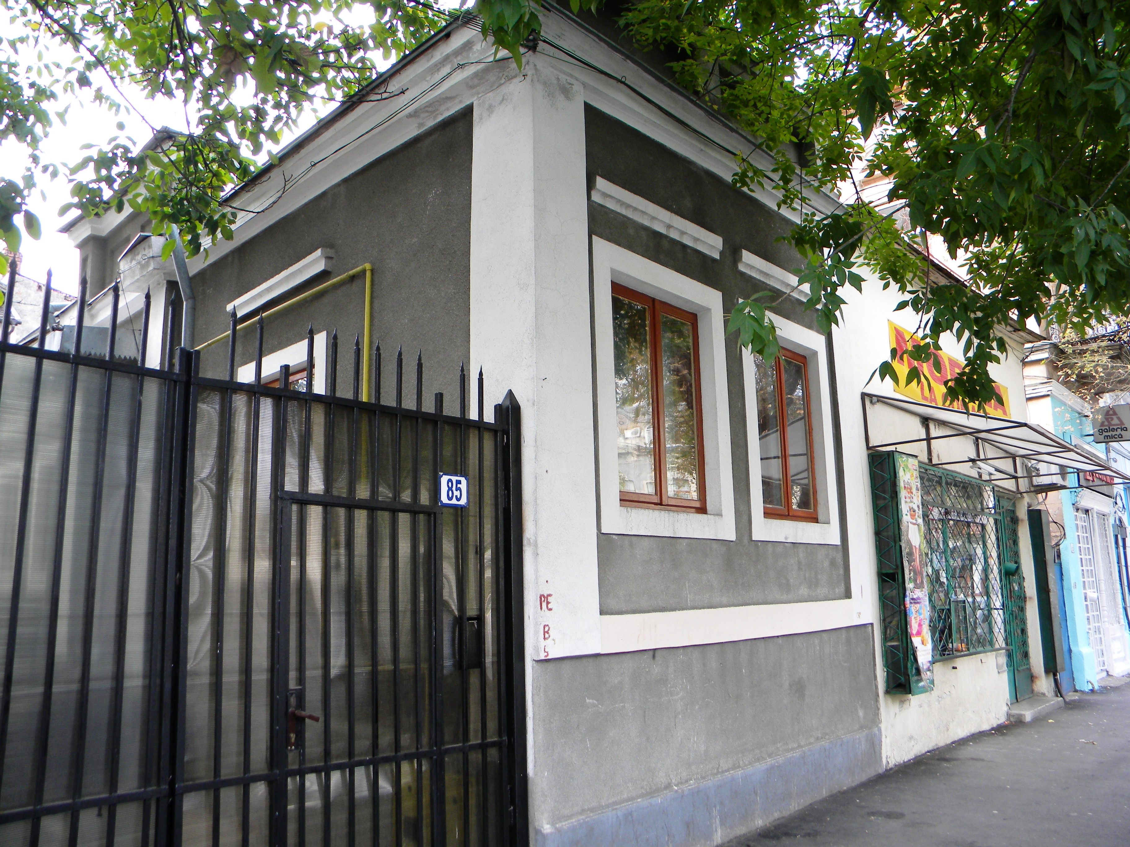 Bucuresti, Romania, Casa pe Calea Grivitei nr. 85, sect. 1